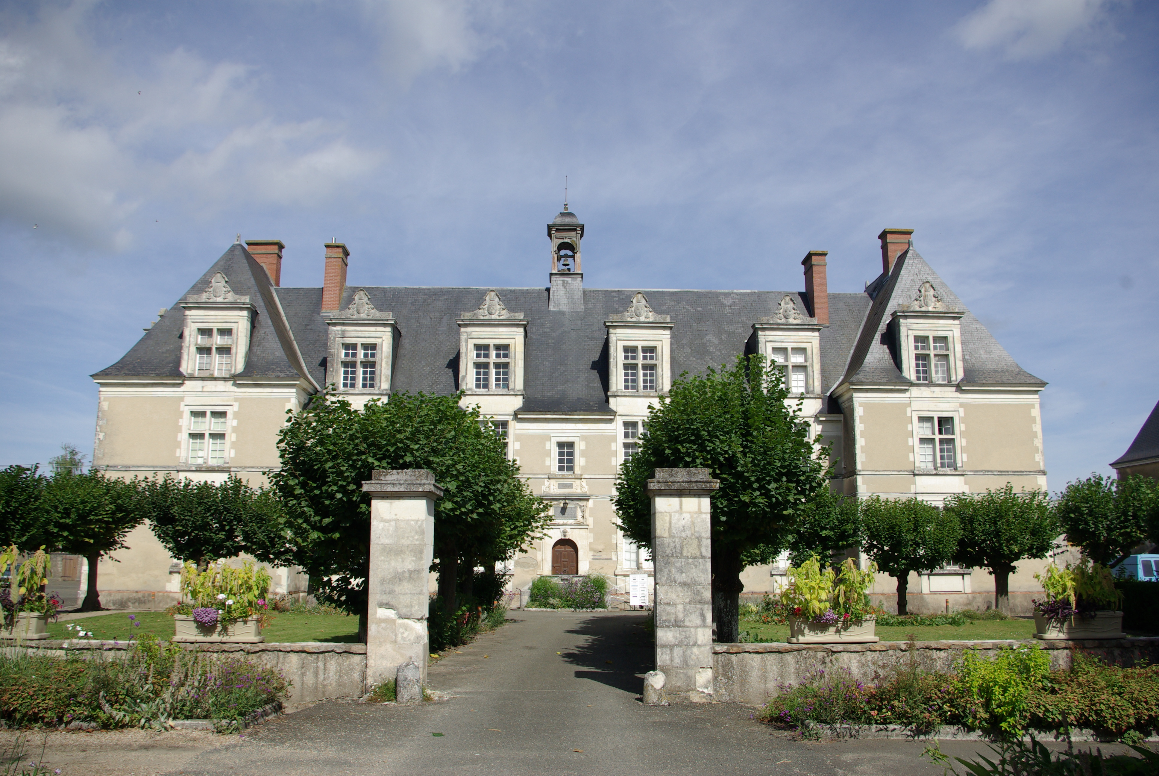 Ancien hospice du Lude.